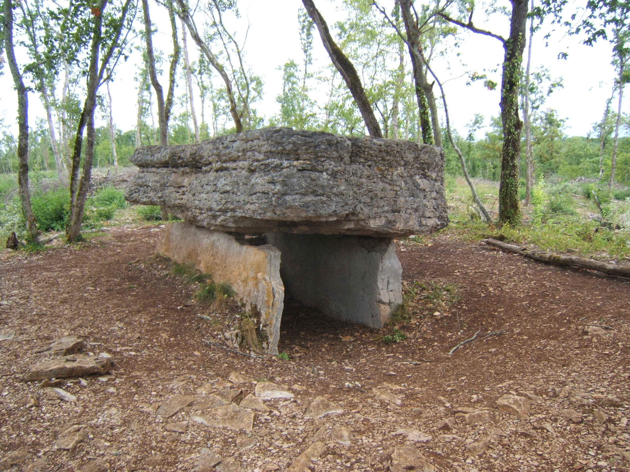 Contrairement à ce que laisserait entendre le nom du fichier, c'est le dolmen d'Aurié